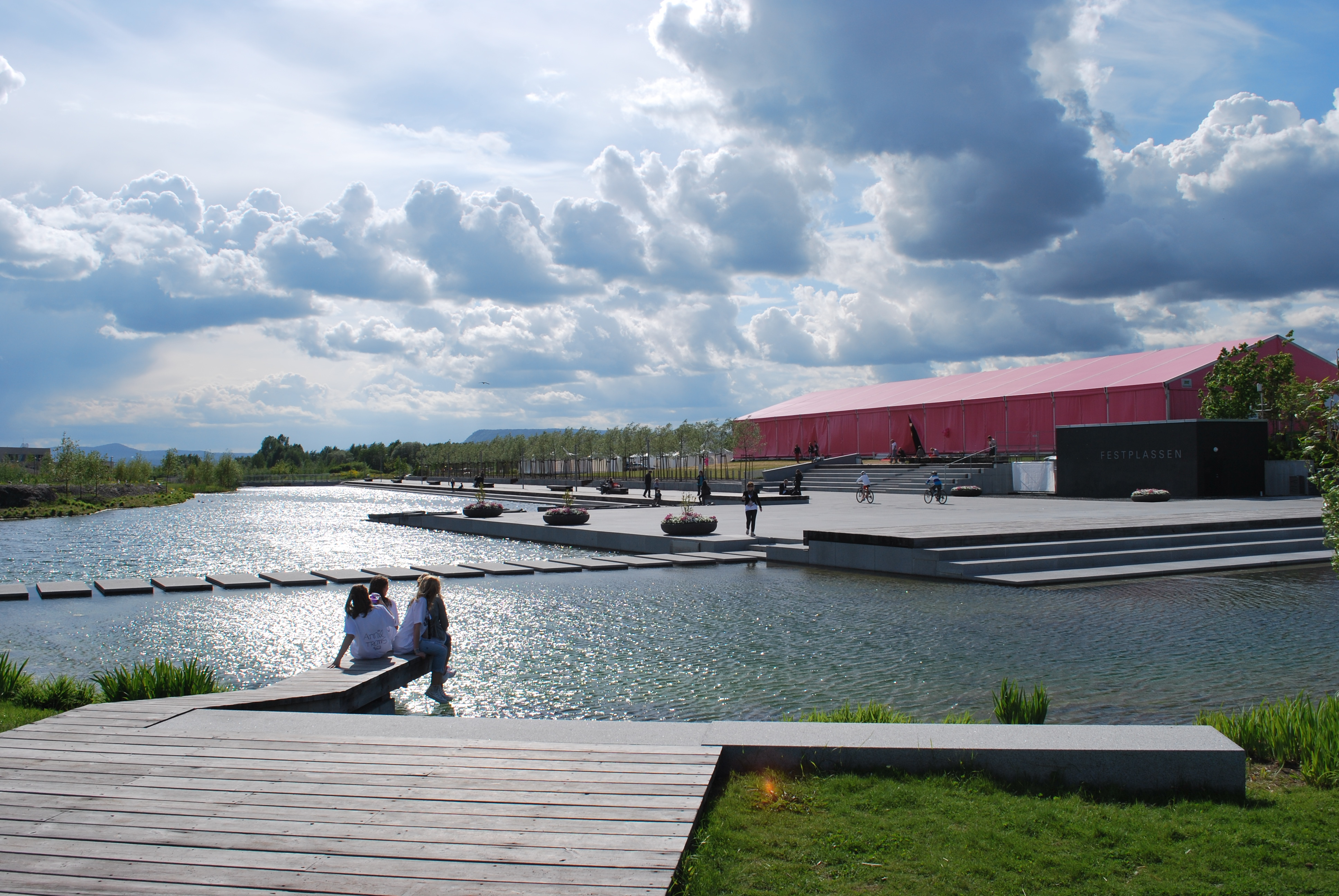 Nansenparken, Fornebu i Bærum. Festplassen og dam. 2010.